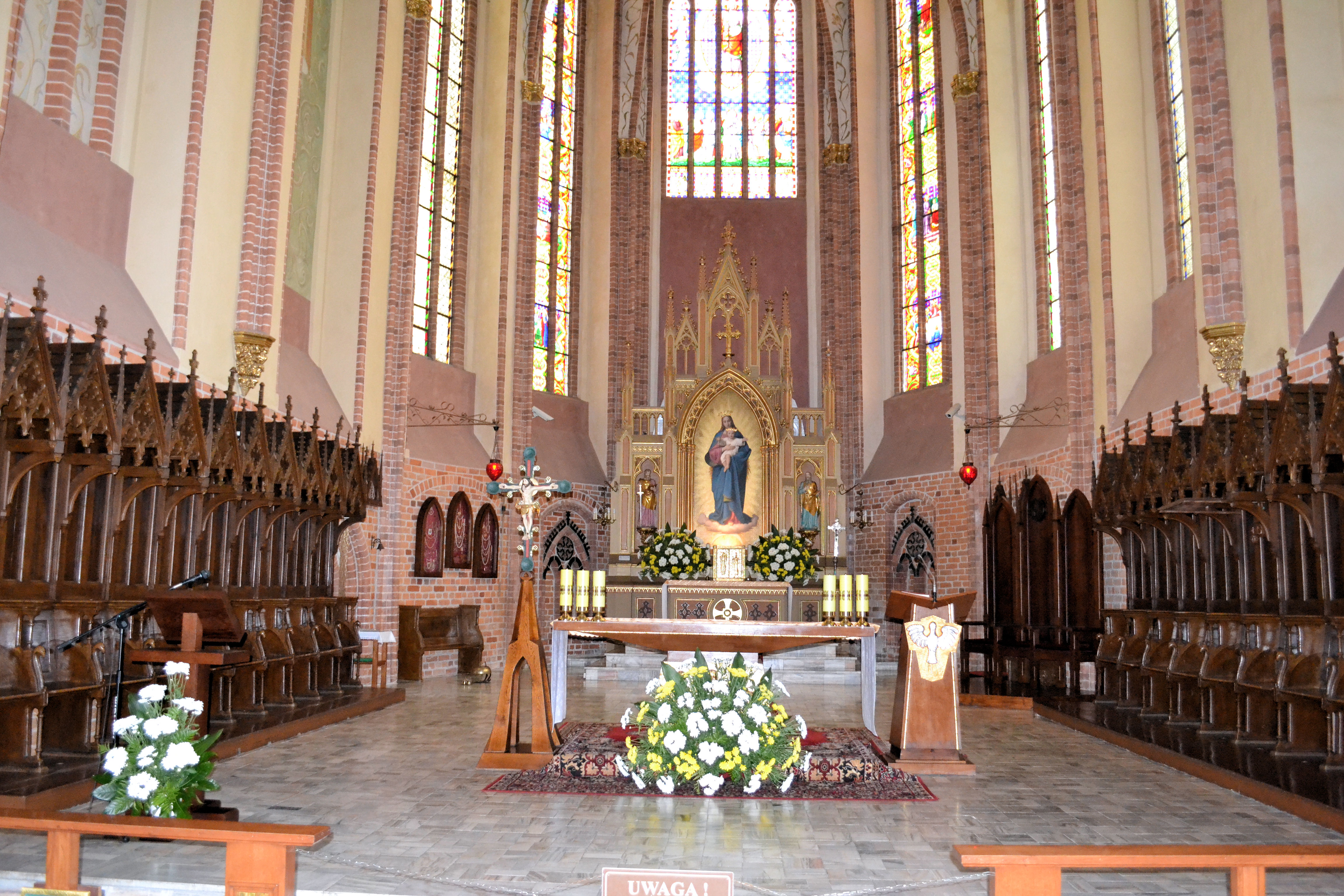 kościół Macierzyństwa NMP Trzebiatów